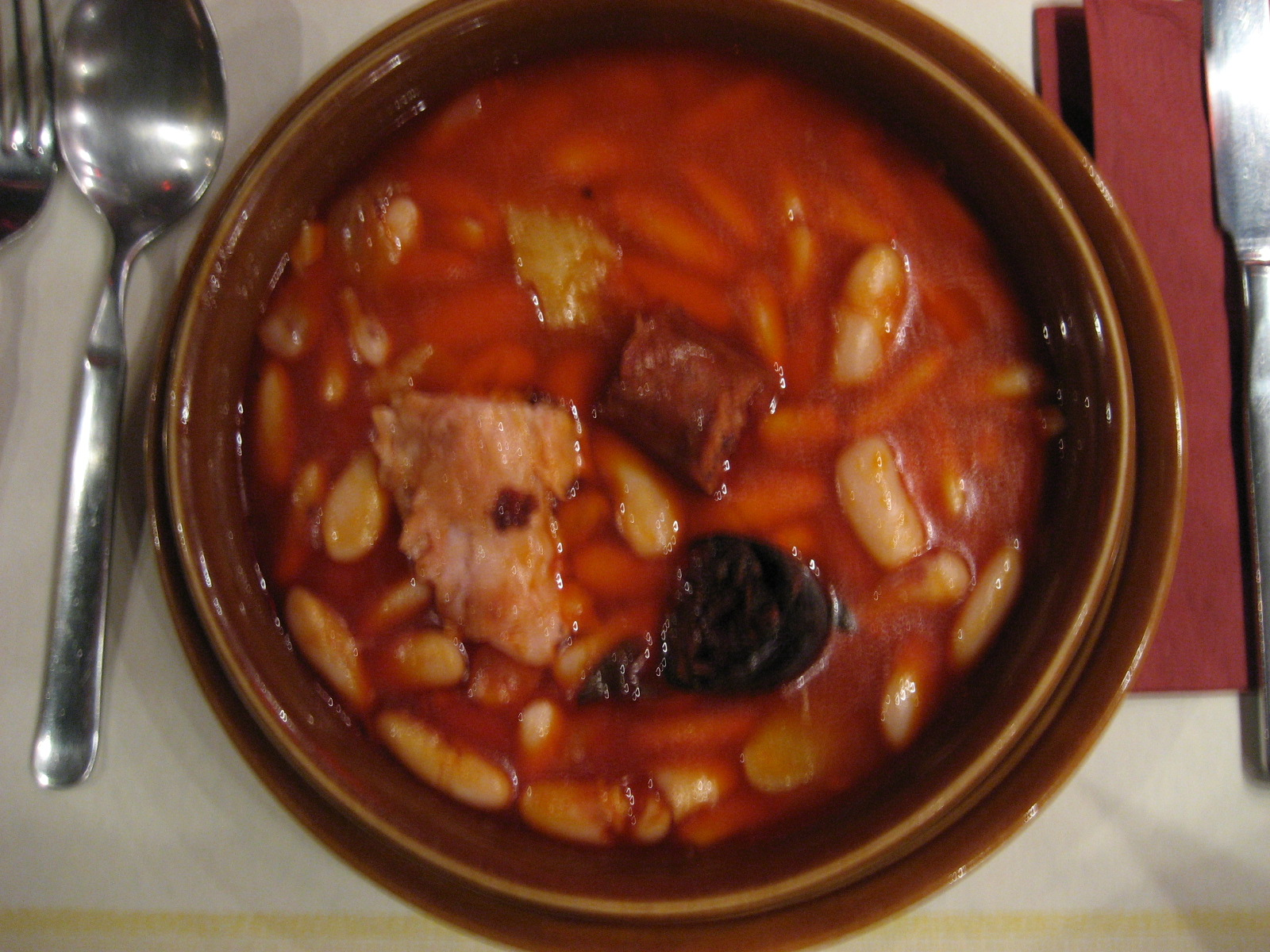 A fabada, a típical dish from Asturias, Spain